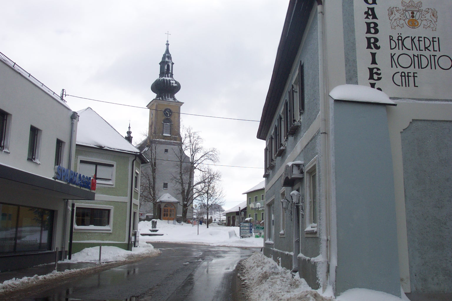 Ort Kollerschlag heute